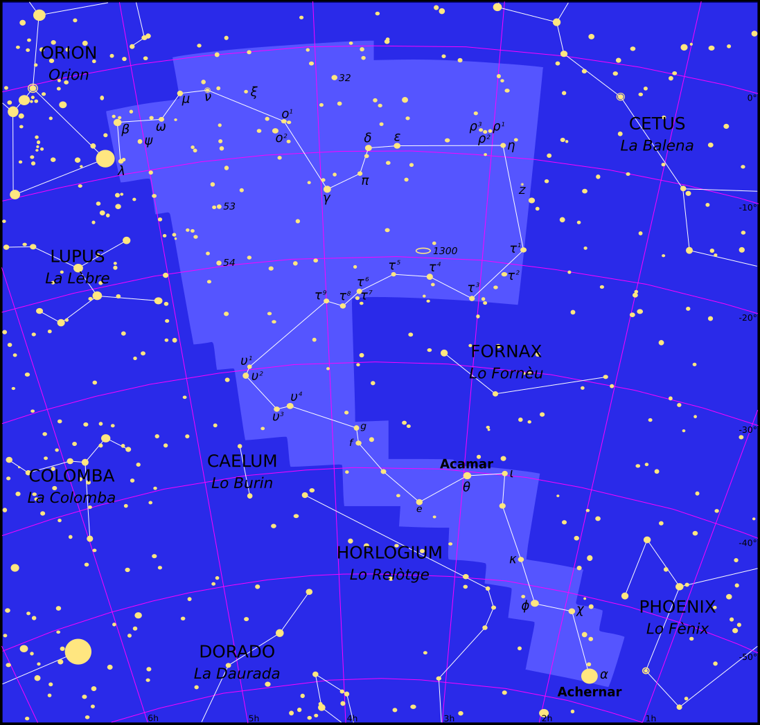 Constellacion d'Eridan.